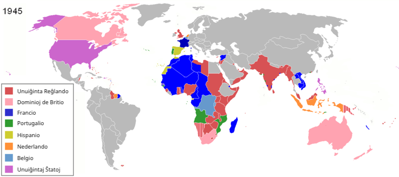 La koloroj reprezentas la koloniojn de diversaj nacioj en 1945, kaj la koloniajn limojn de tiu tempo.